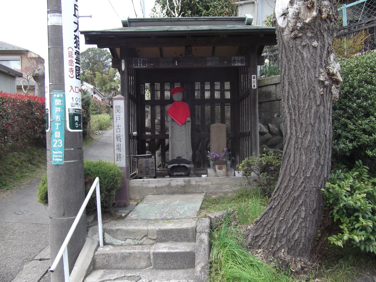 関戸古戦場跡。東京都多摩市。